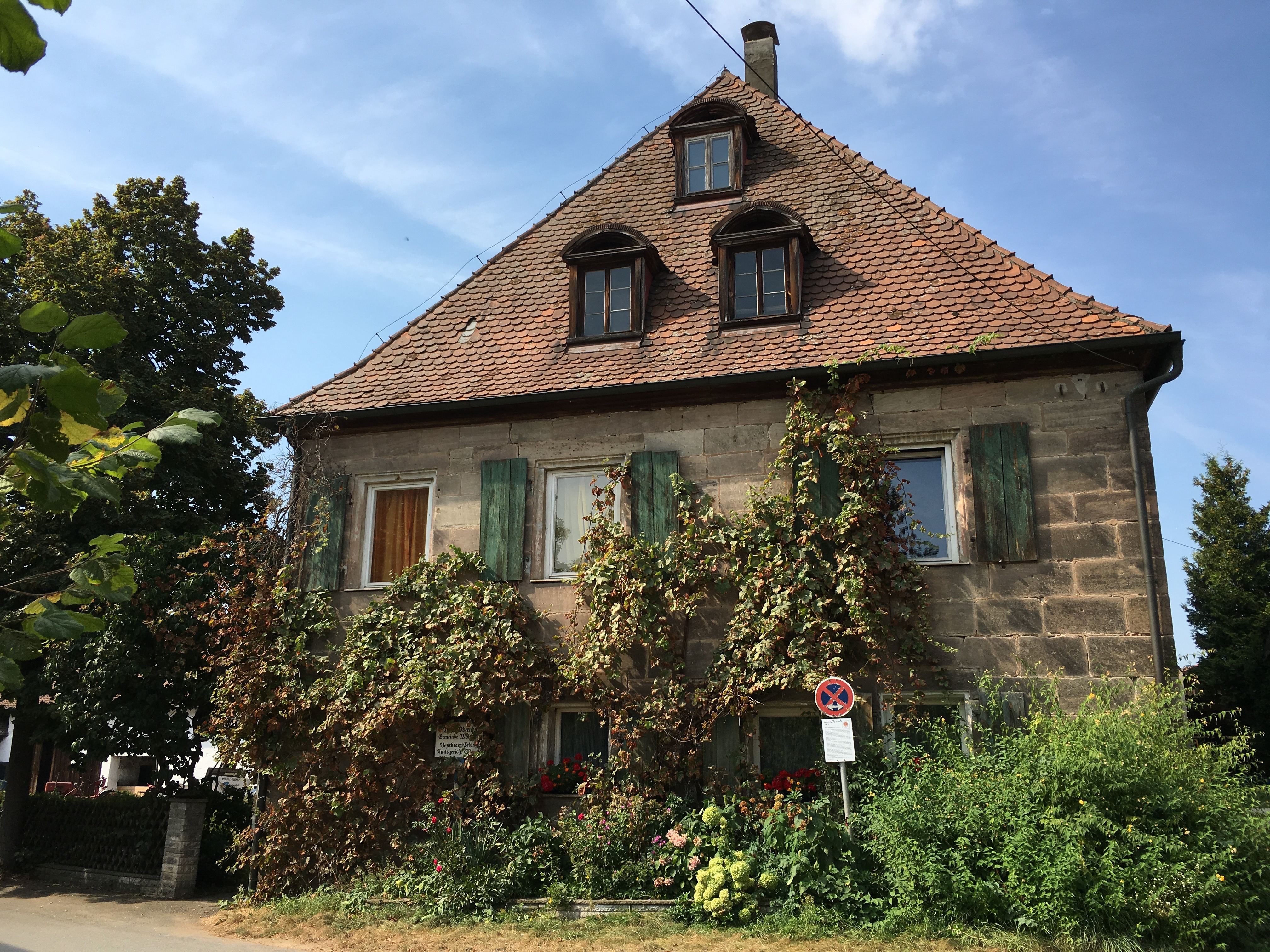 Oberndorf Nummer 1